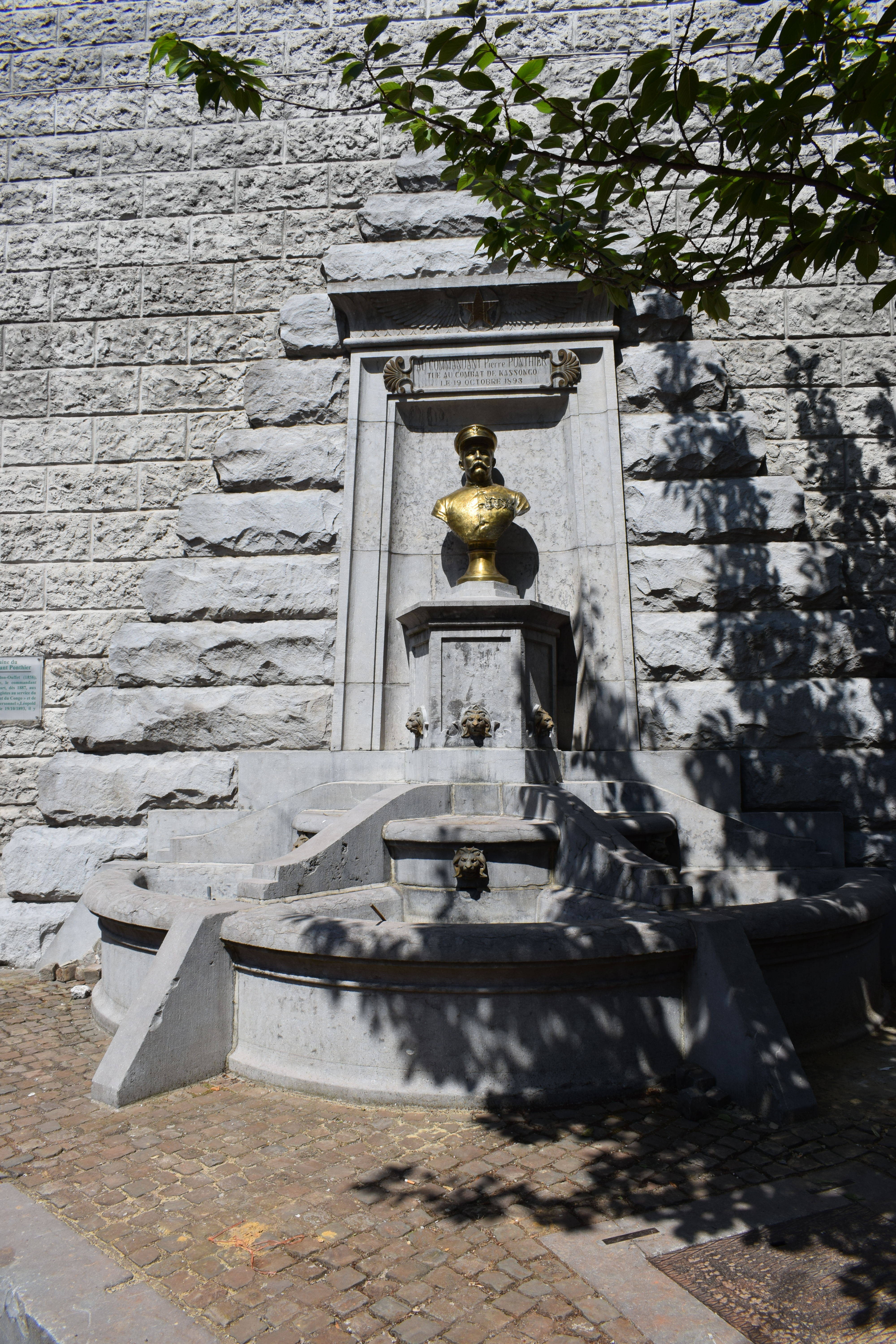 Vue de Marche-en-Famenne, dans la province de Luxembourg en Belgique.